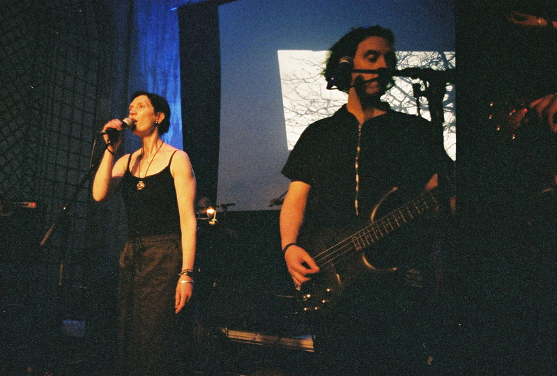 Collection D'Arnell Andréa @ Dark Omen II Festival - Château de Vaux-le-Pénil